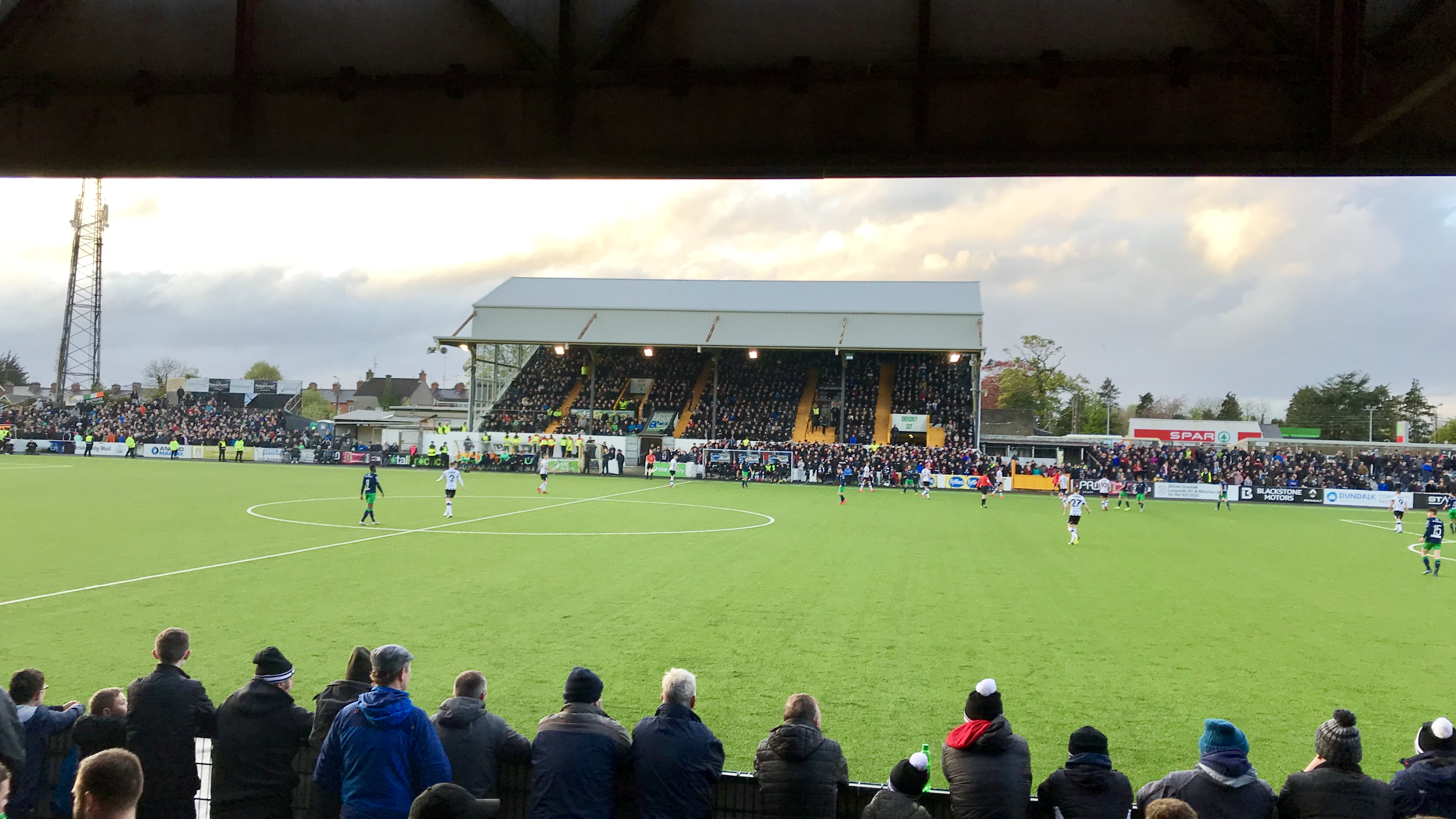 Oriel Park, Dundalk, Ireland, April 2019